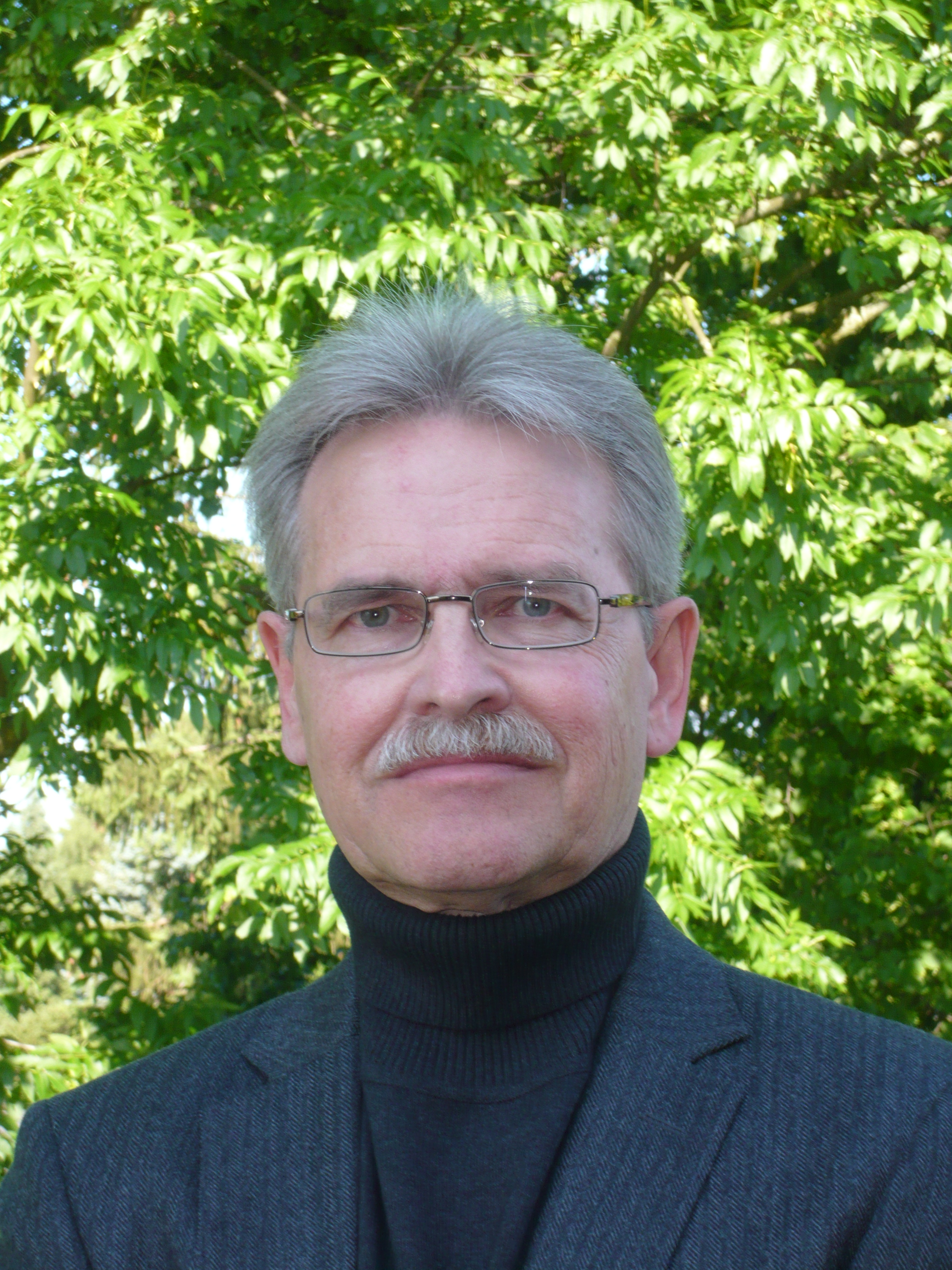 Autorenfoto Joachim Köhler